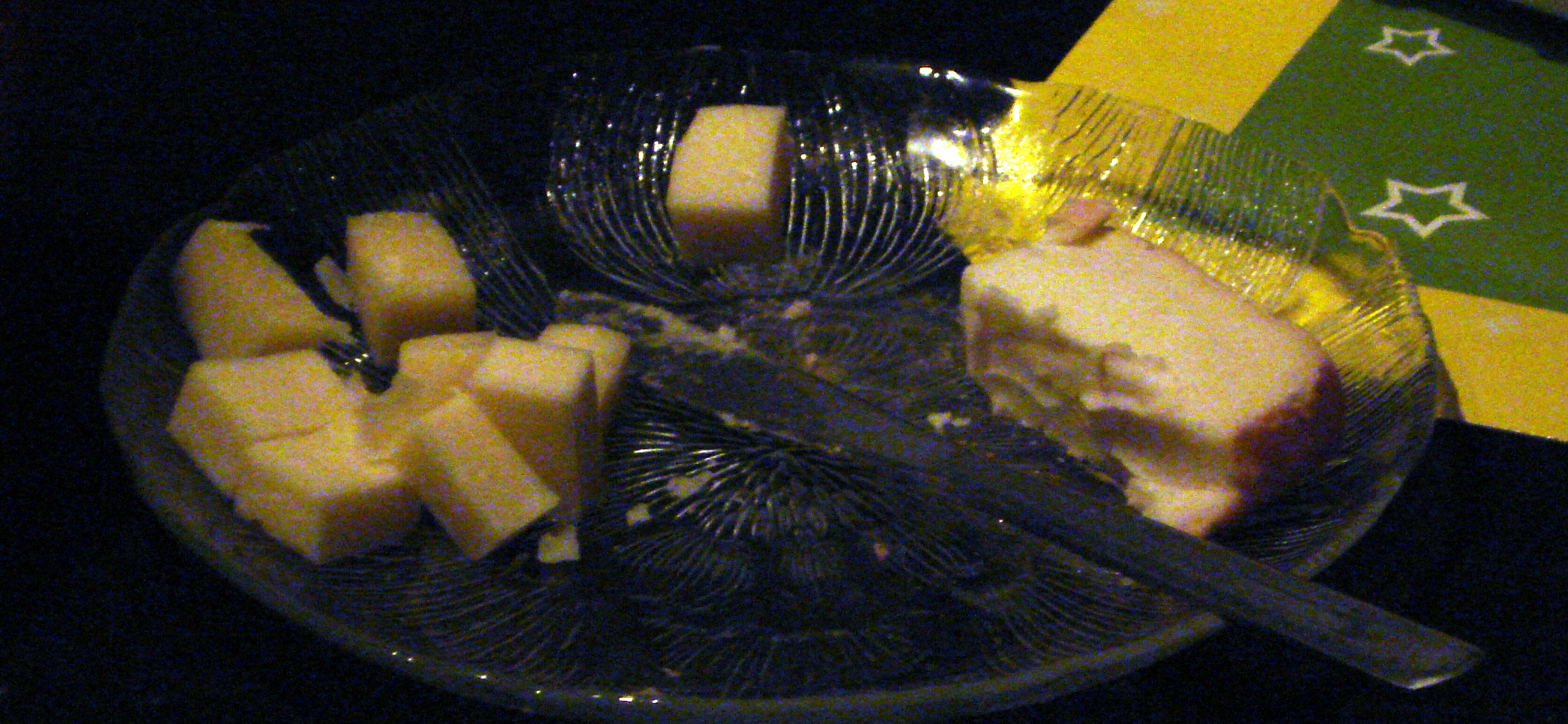 Kittost, en svensk ost